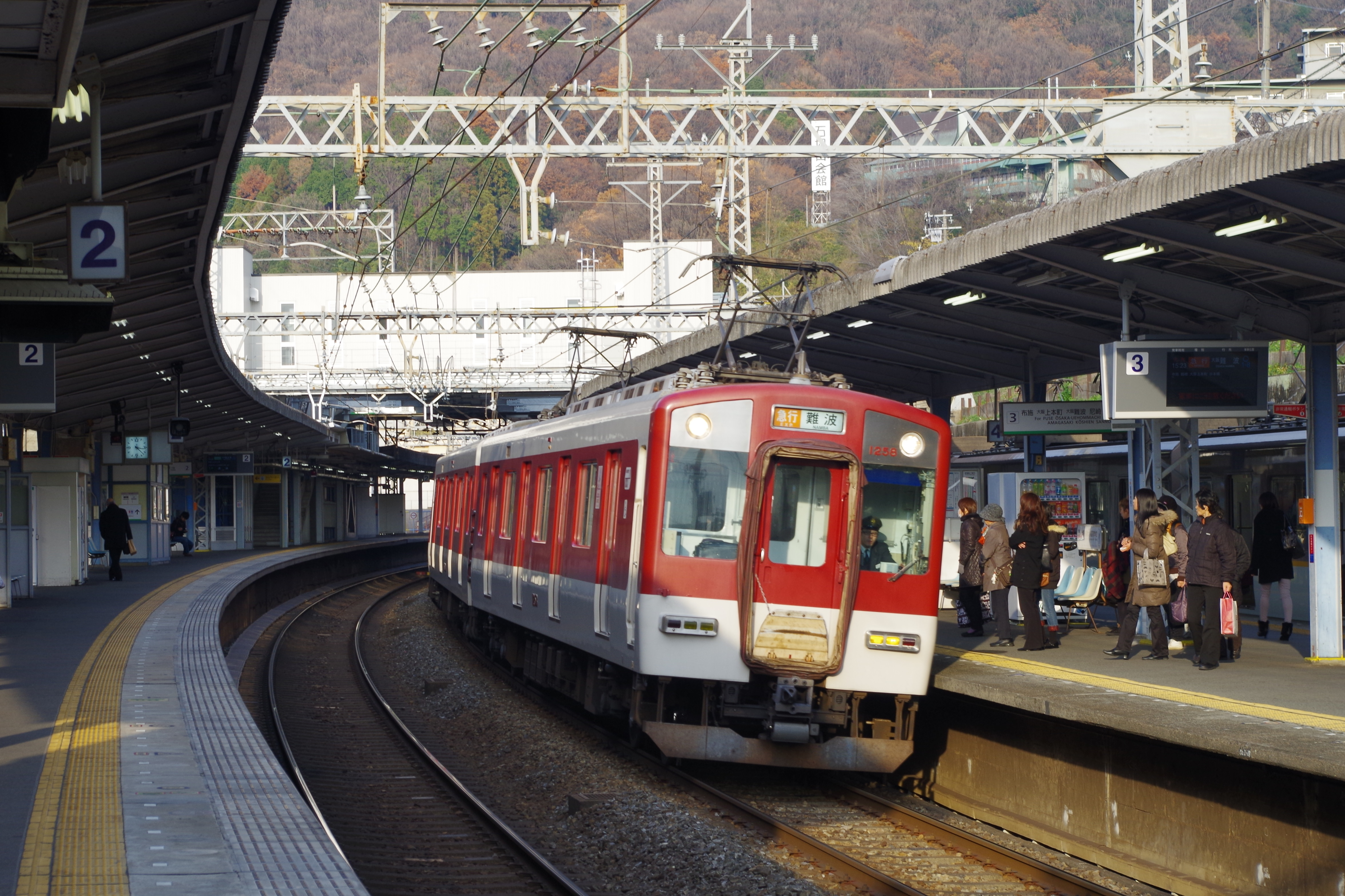 近鉄奈良線 石切駅 Ishikiri station 2012.12.23